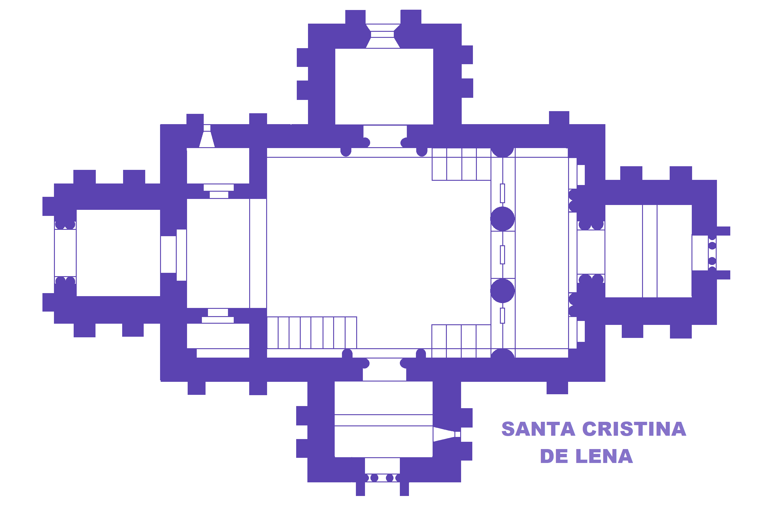 Eglise Santa Cristina de Lena, Espagne, Plan